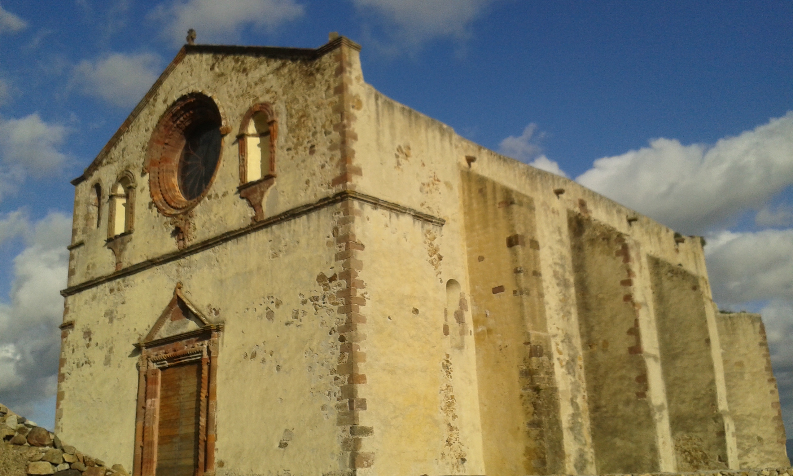 Chiesa di San Bachisio, Bolotana (NU)